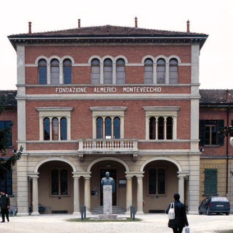 Il Campus di Scienze degli Alimenti.